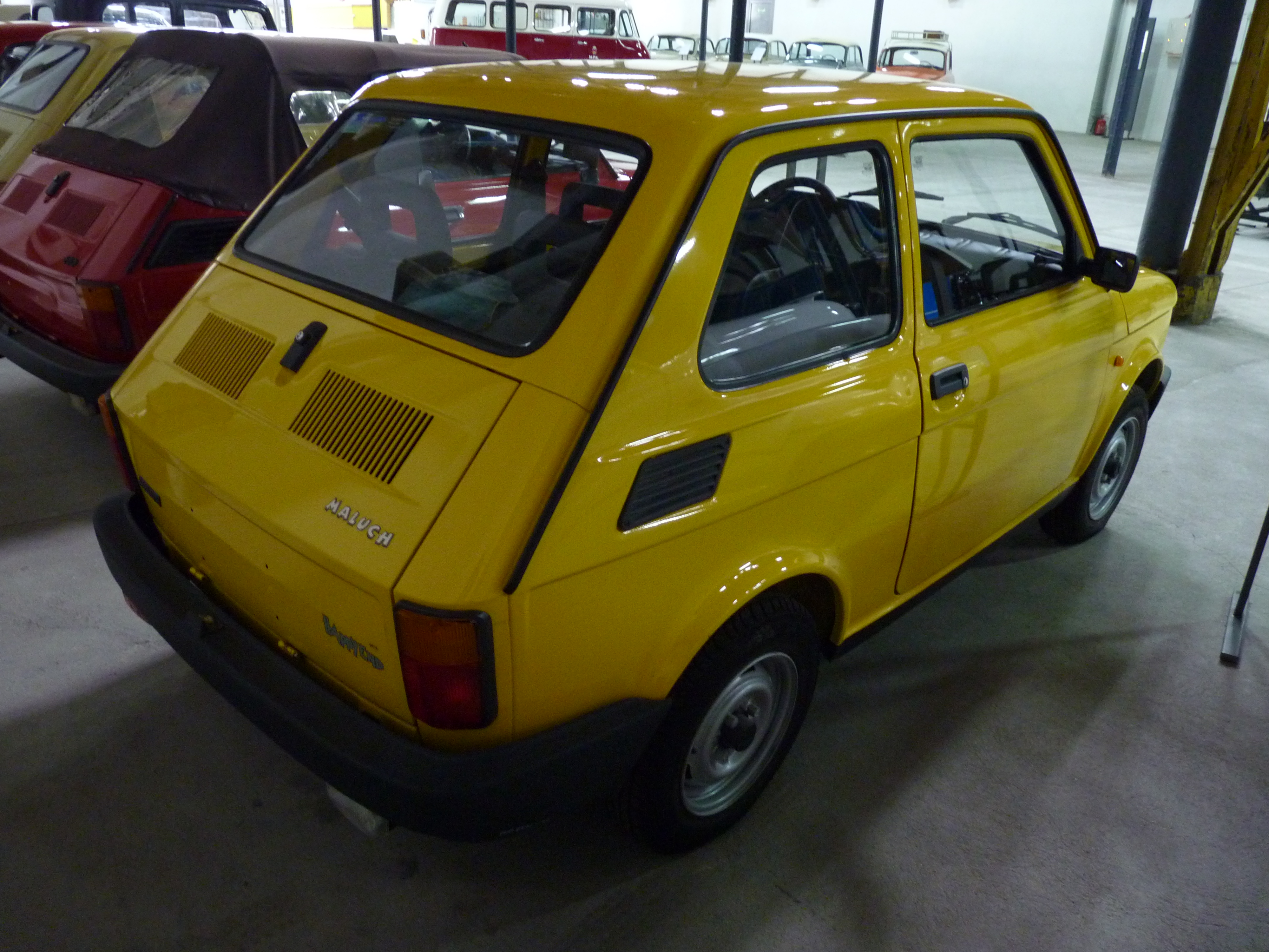 Fiat 126 elx Maluch Town Happy End at Muzeum Inżynierii Miejskiej in Kraków.